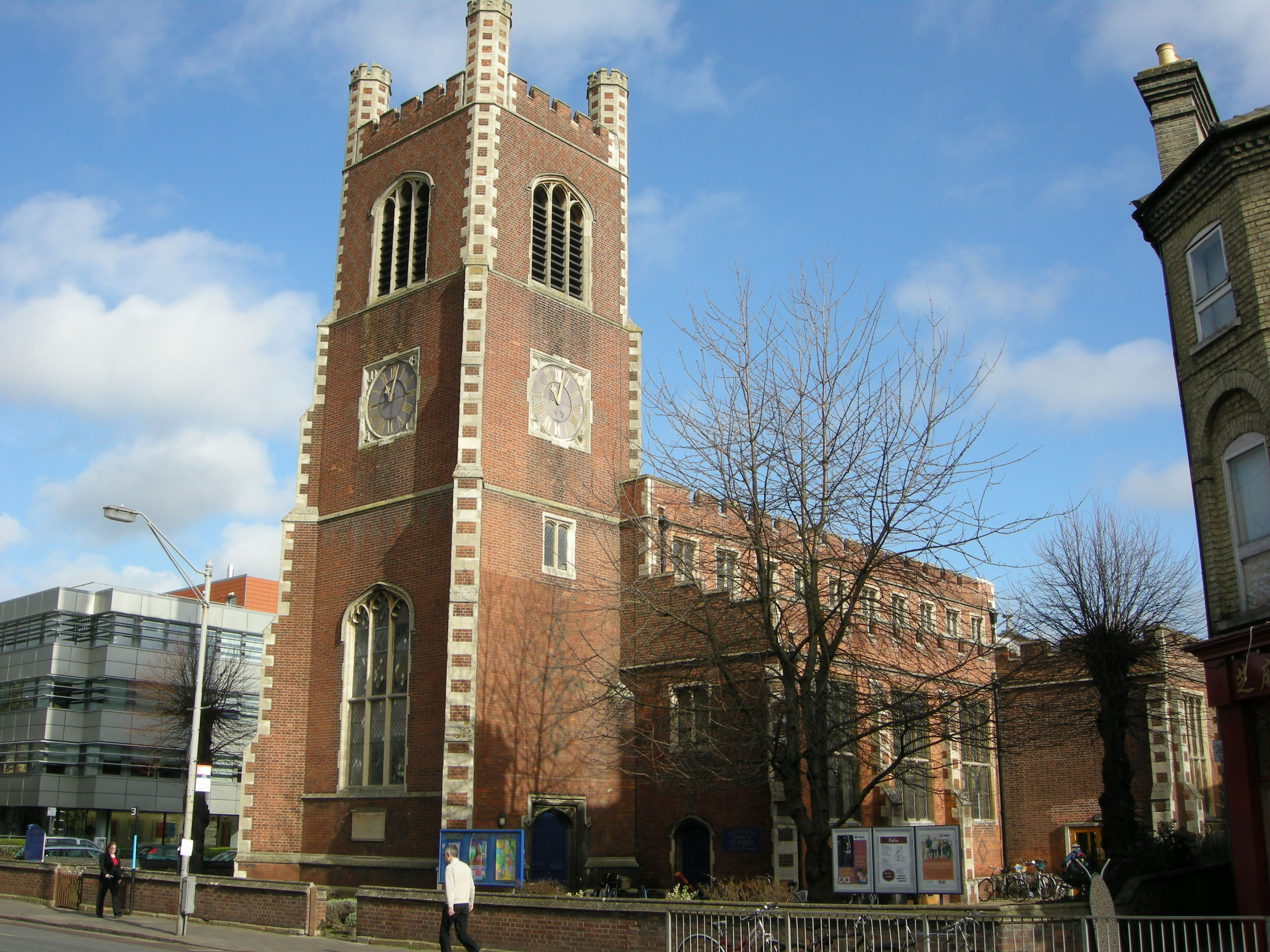 Cambridge, chiesa di saint paul